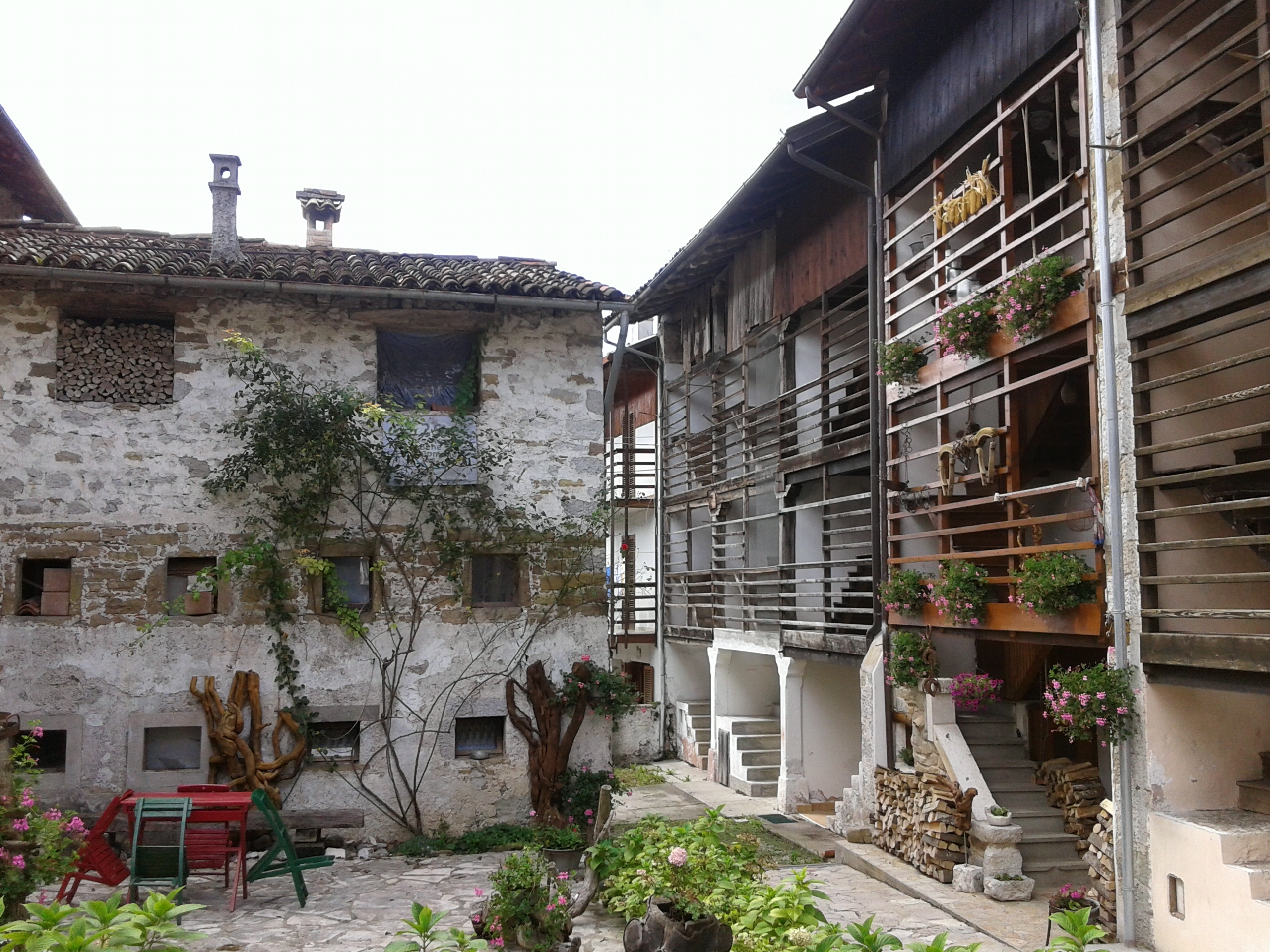 Case a ballatoio Andreis